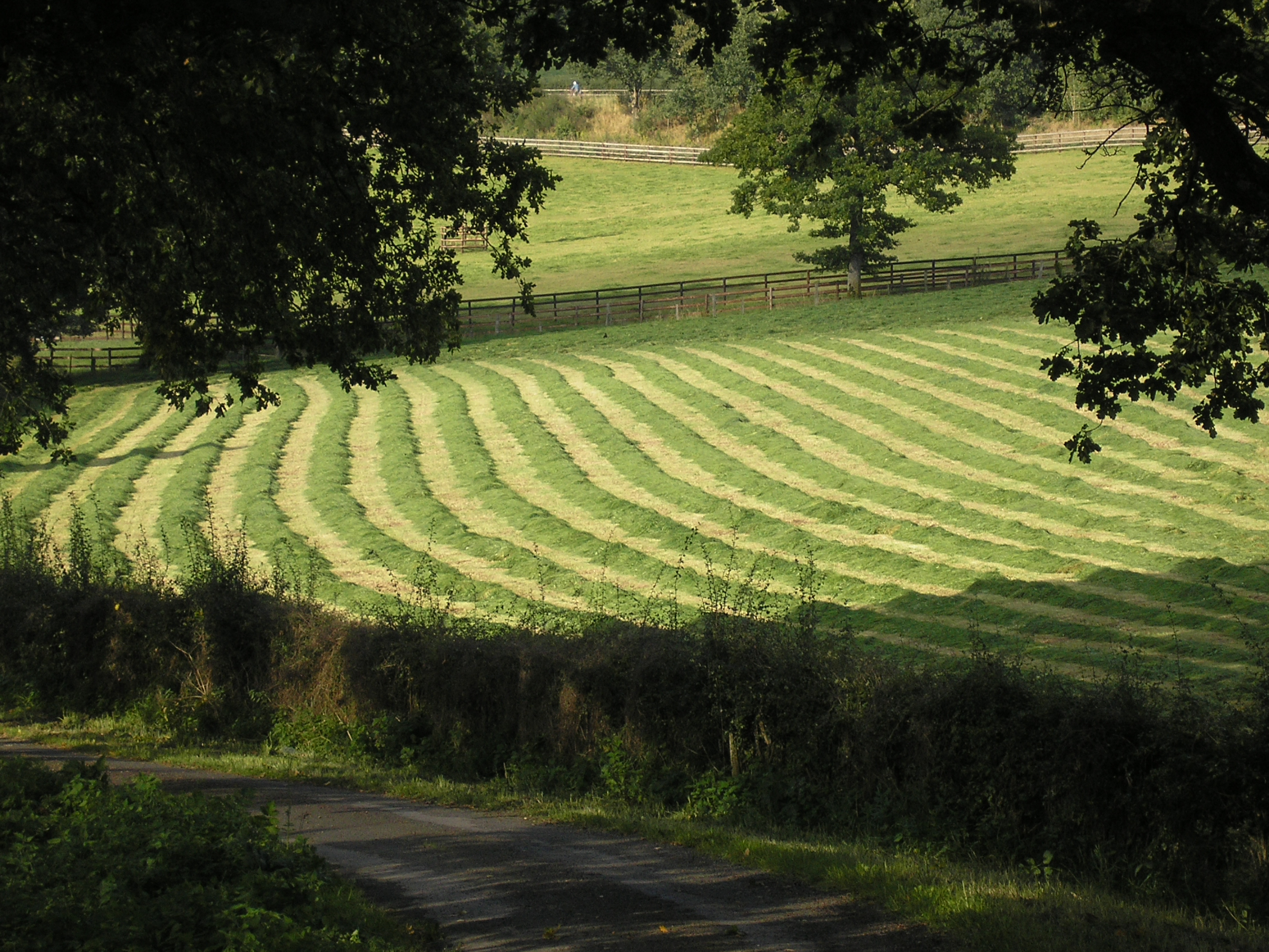 Heu in Schwaden; Heuernte bei Iveldingen, Gemeinde Amel, Ostbelgien. – Am 14. Okt. 2009 wurde dieses Bild zum Überraschungsbild des Tages in der deutschsprachigen Wikipedia ausgewählt.